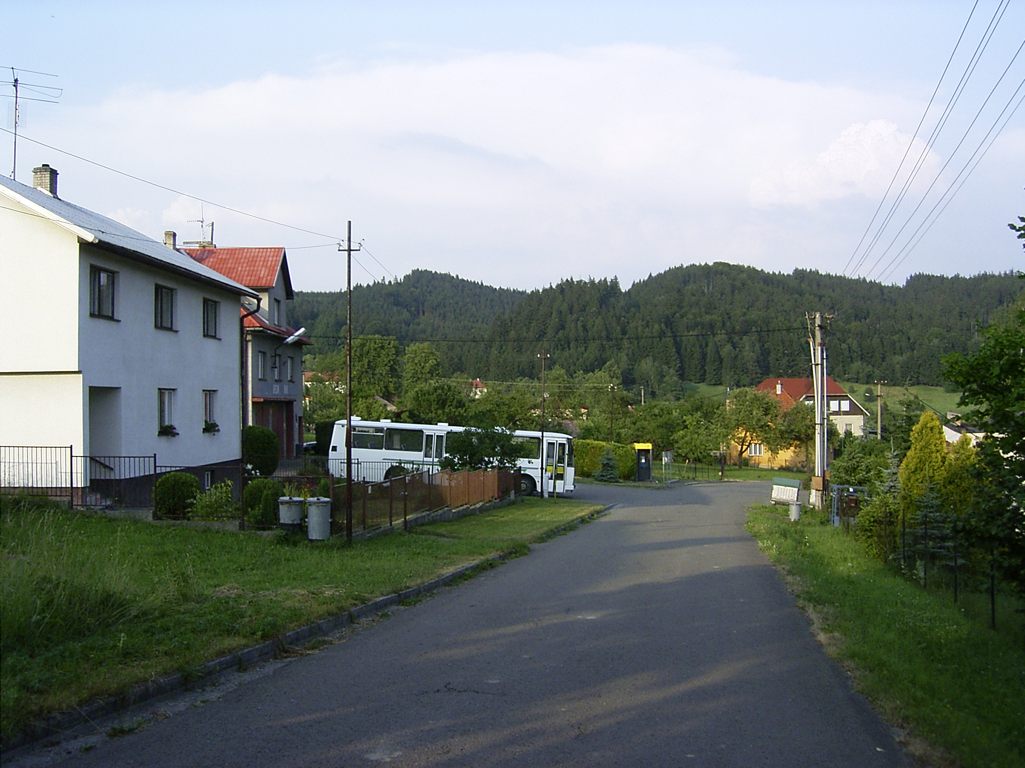 Obec Oznice